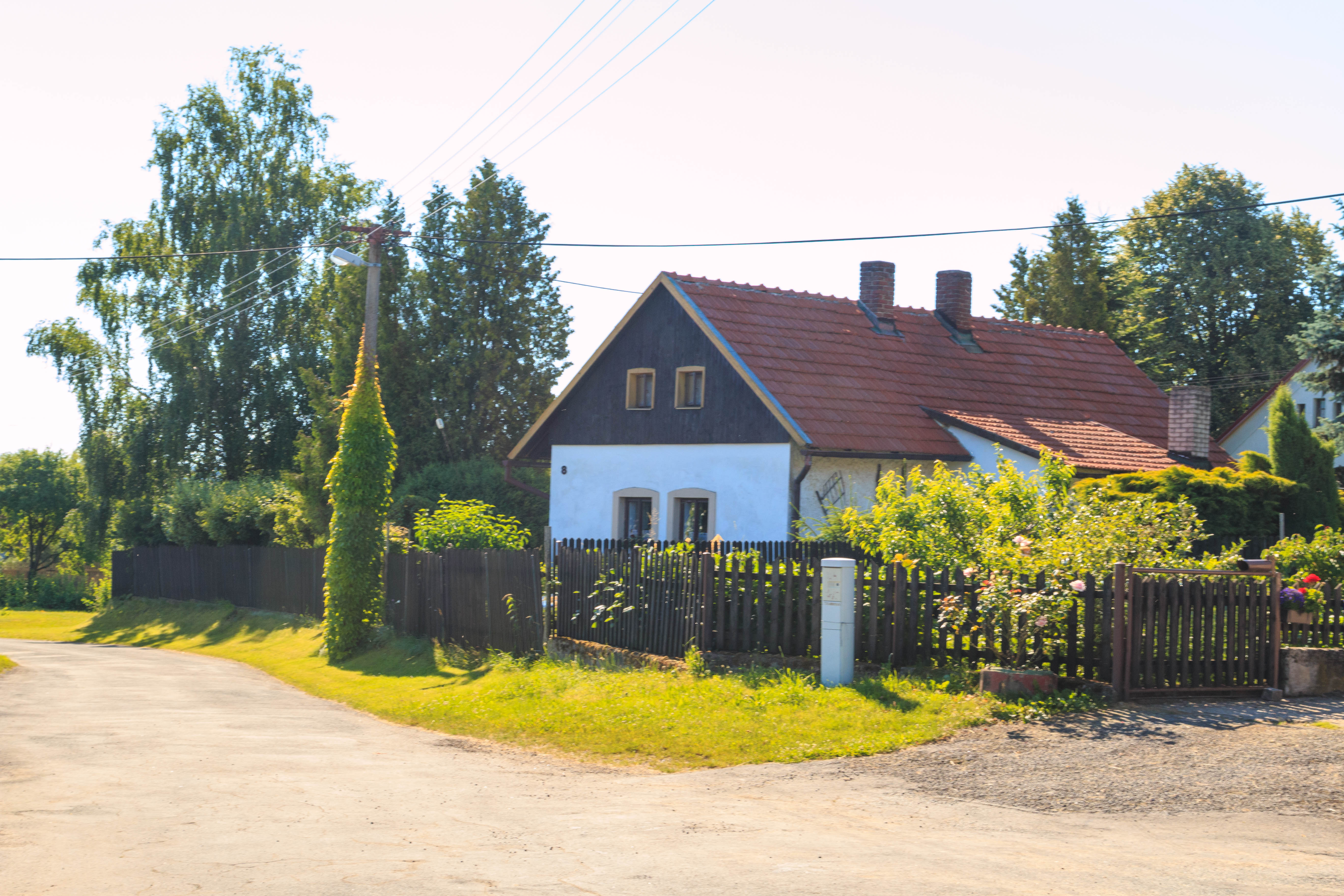 Hostovlice u Vilémova čp. 8